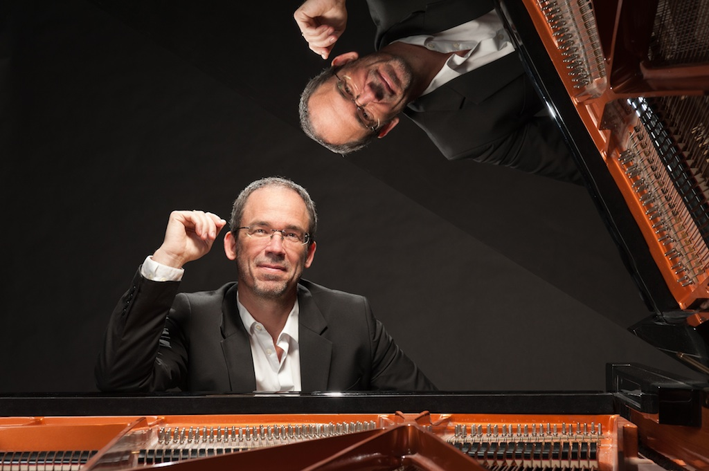 Michael Schütz am Flügel